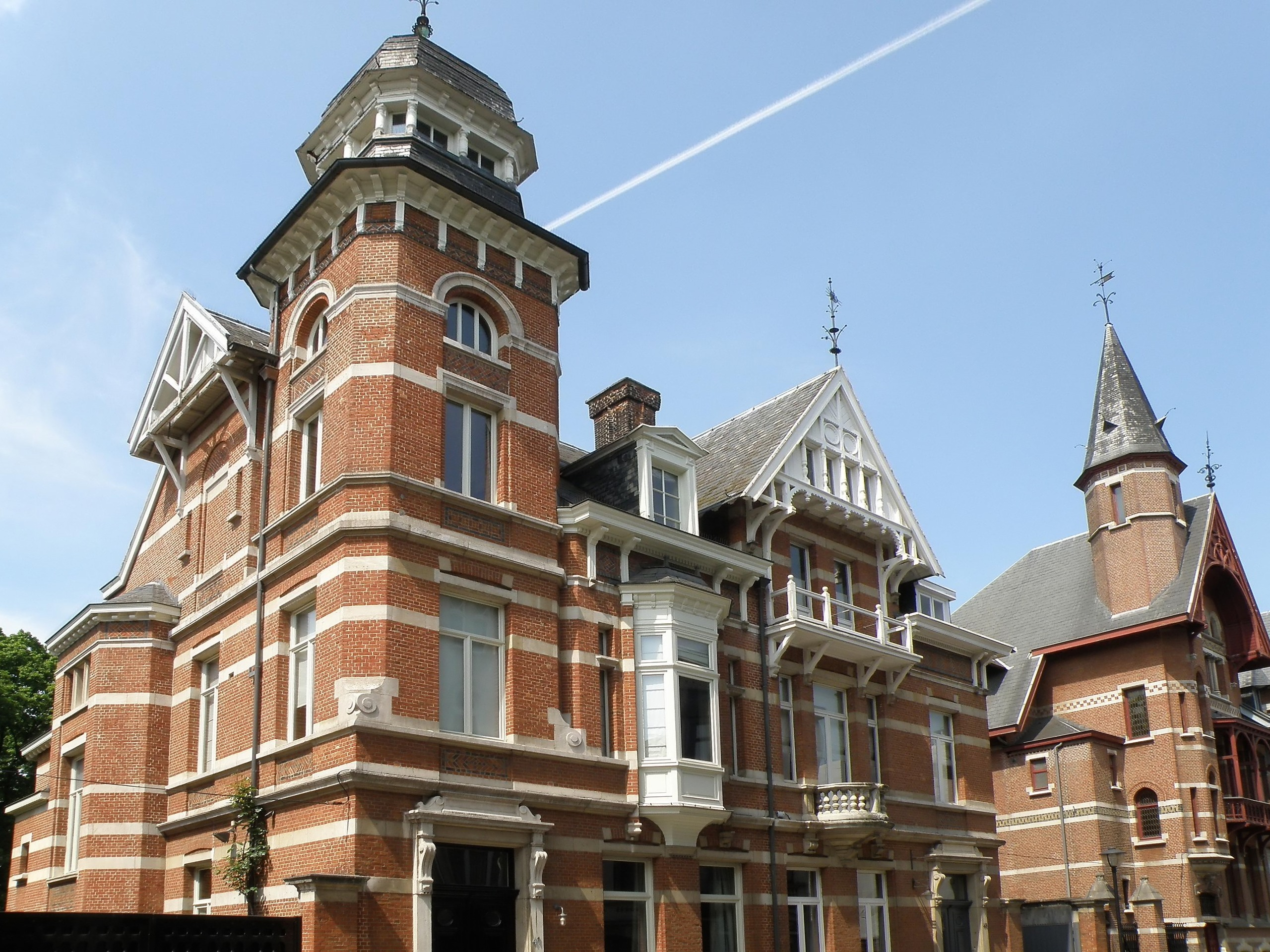 Antwerpen, district Berchem. Wijk Zurenborg, huizen Transvaalstraat nr. 41 en 43, ontworpen door Leonard en Henri Blomme (1892). Vgl. Inventaris Bouwkundig Erfgoed.